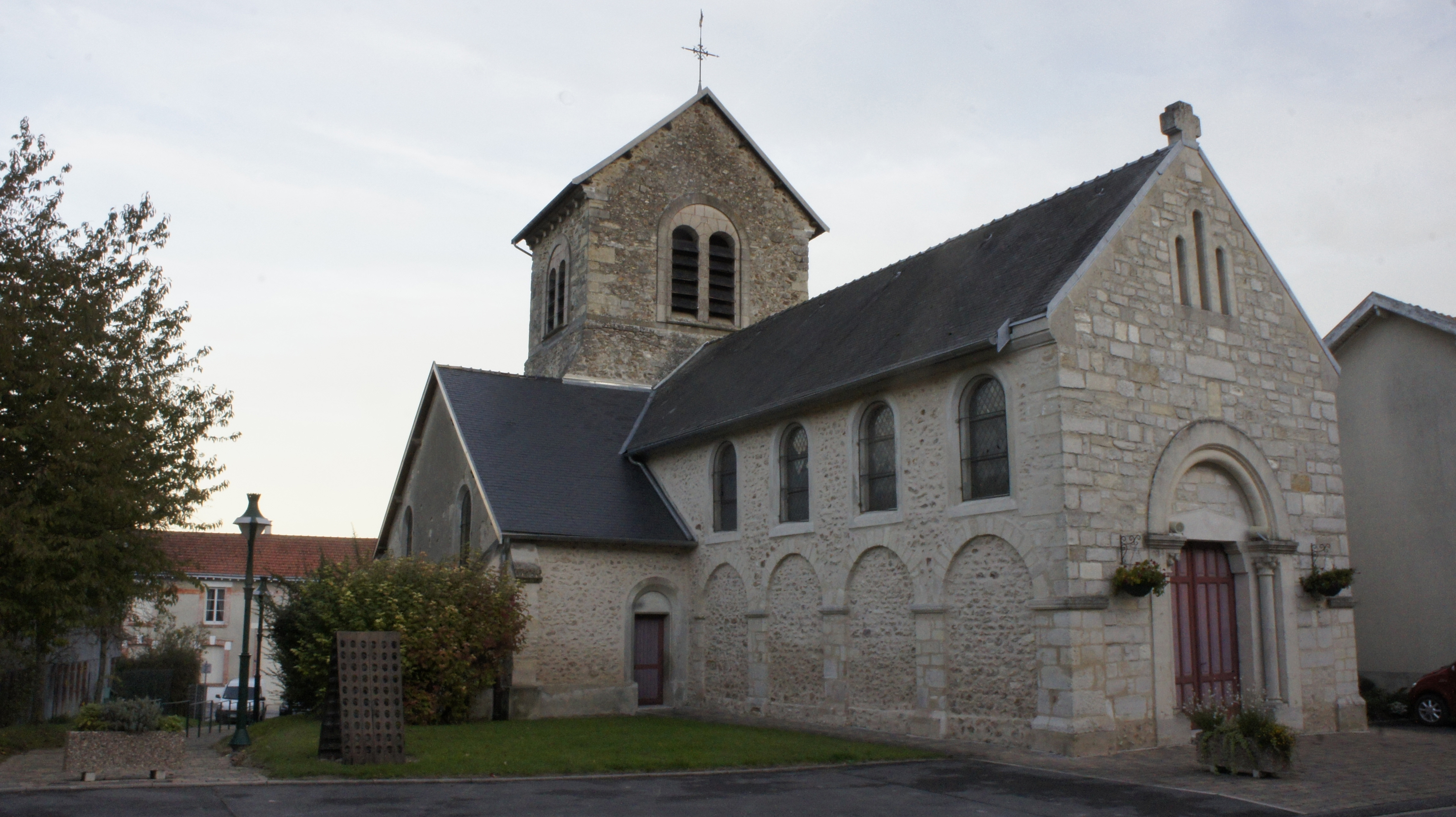 Vue de l'église au village de Nogent-l'Abesse.